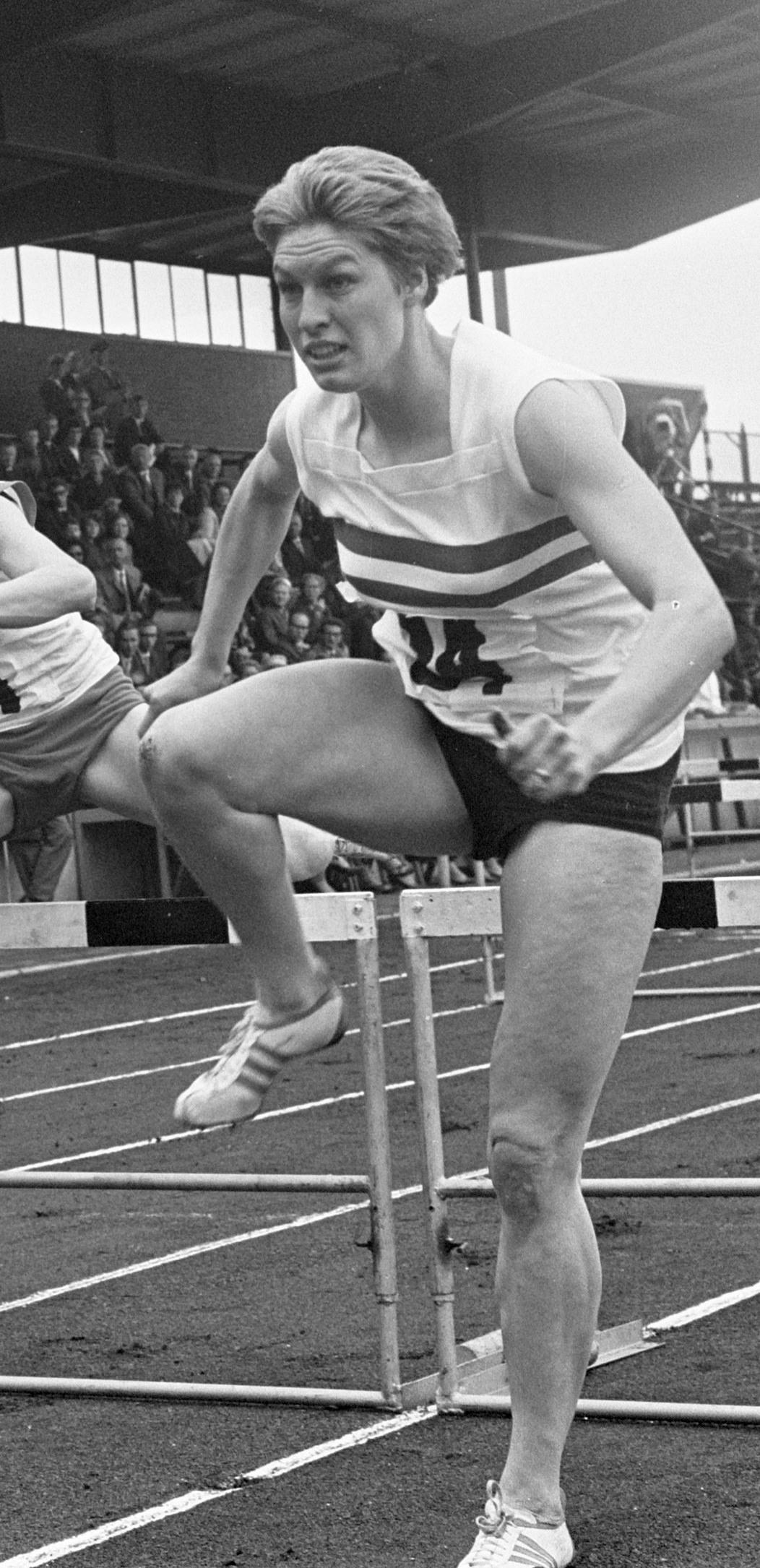 Atletiek Nederland tegen Engeland dames in Enschede, 80 meter horden, Pat Pryce